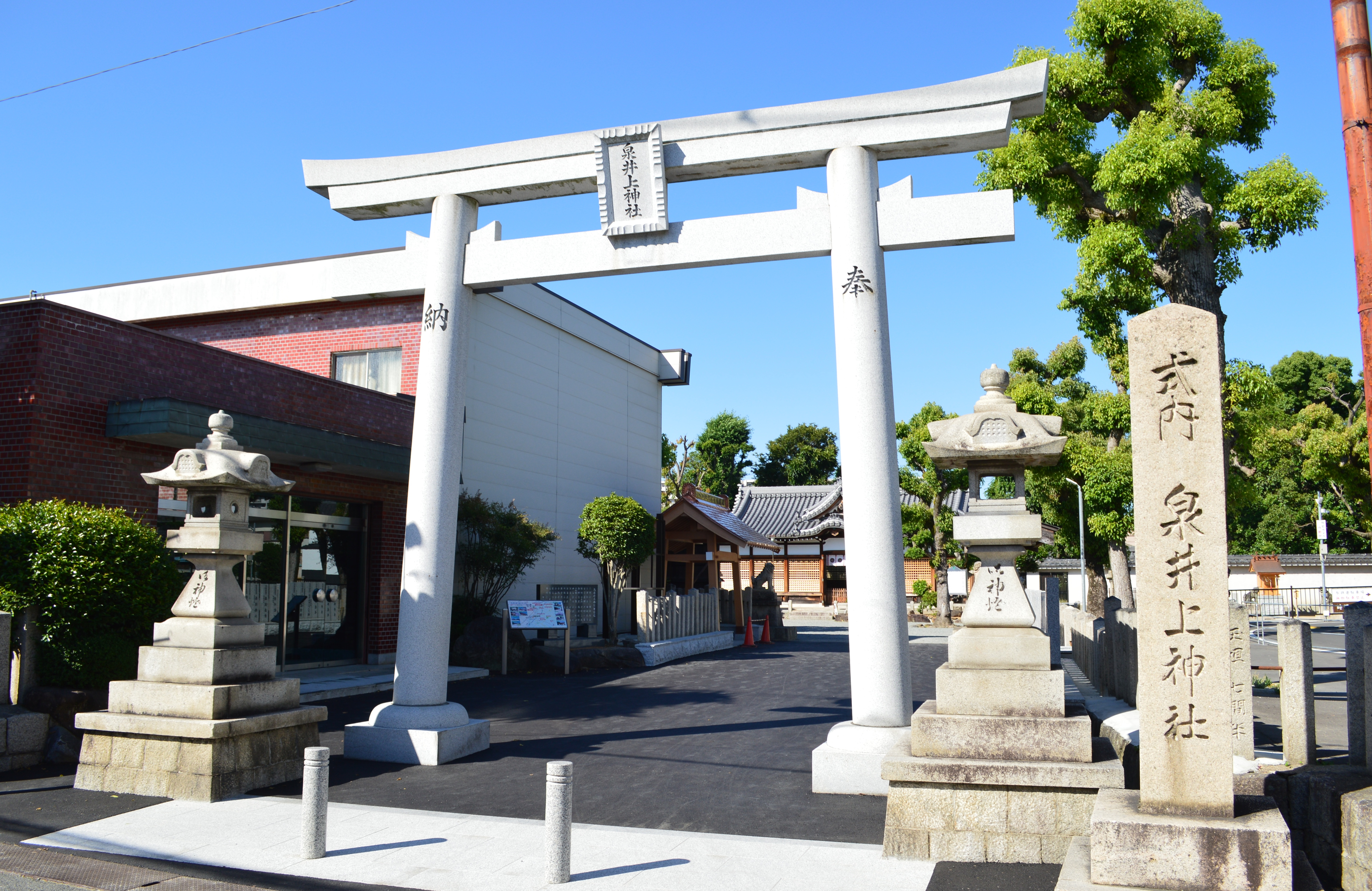 泉井上神社 鳥居 Nikon D3200